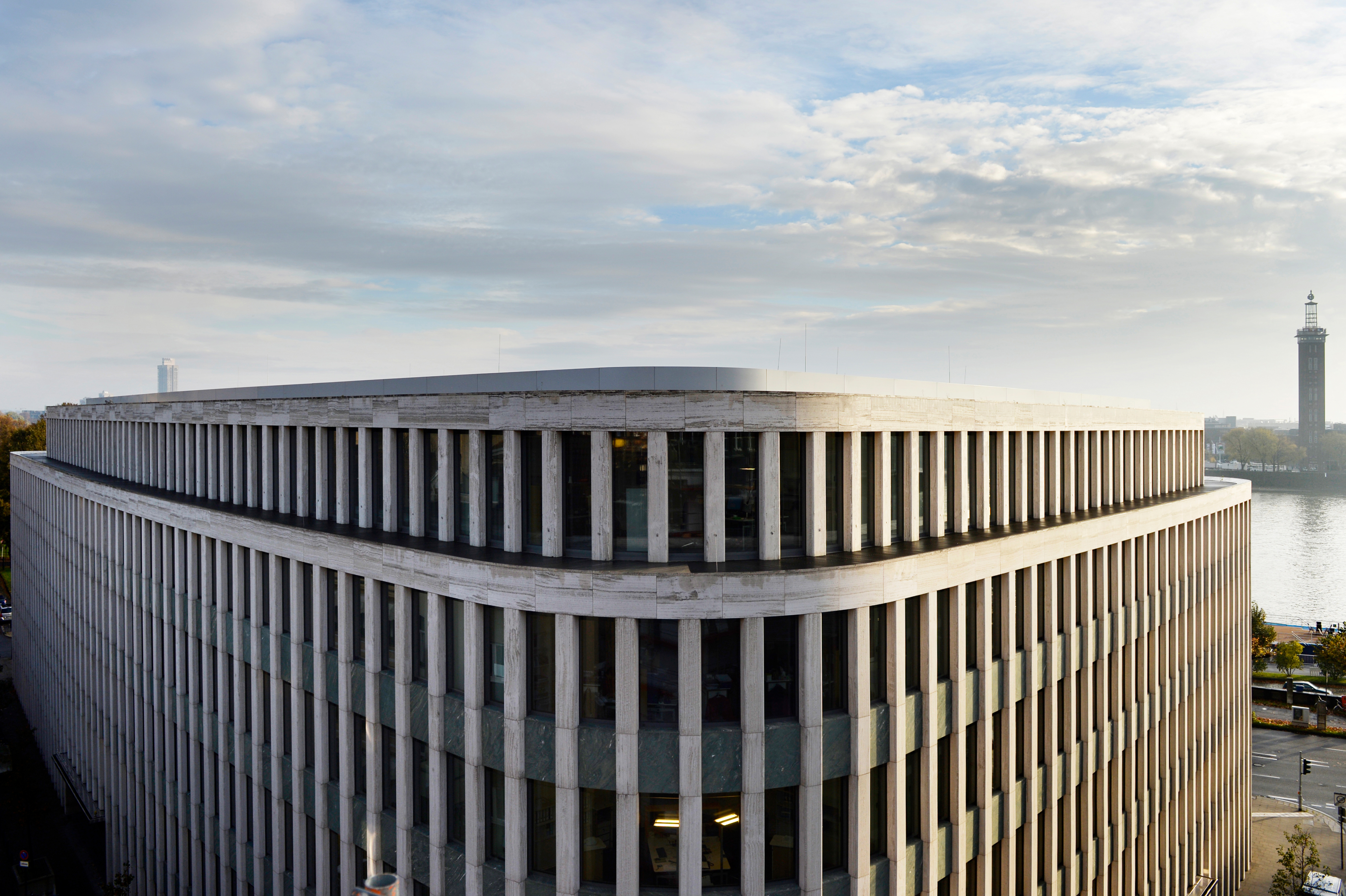 Das Institut der deustchen Wirtschaft am Kölner Rheinufer